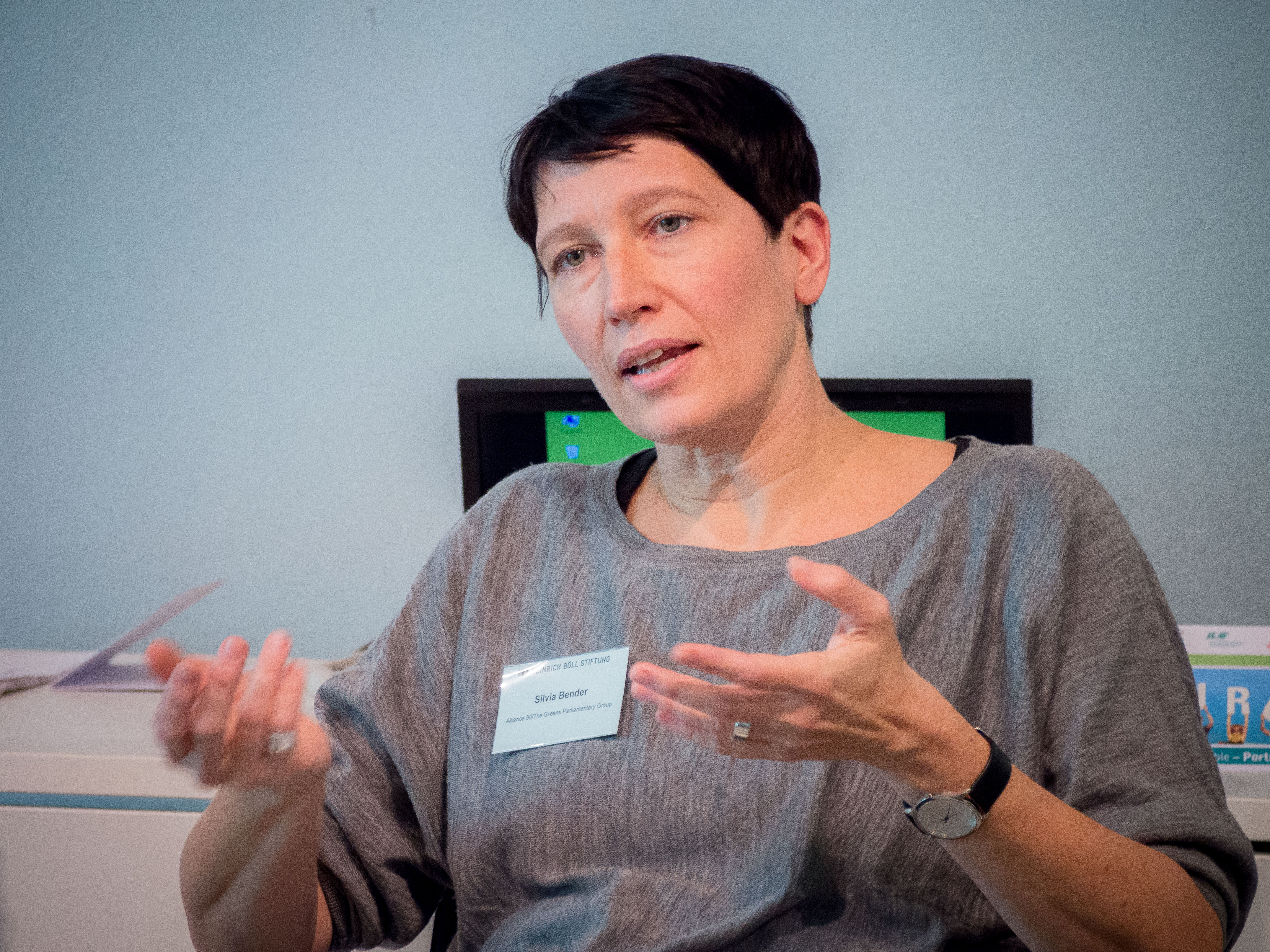 Silvia Bender (Bundestagsfraktion Bündnis 90/Die Grünen)